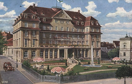 Schloßhotel Gotha 1912, koloriert